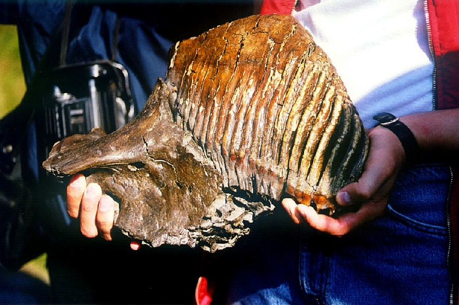 Mammutzahn mit Teil des Kieferknochens, gefunden in Ust-Port, Region Taymyr, Jenissei